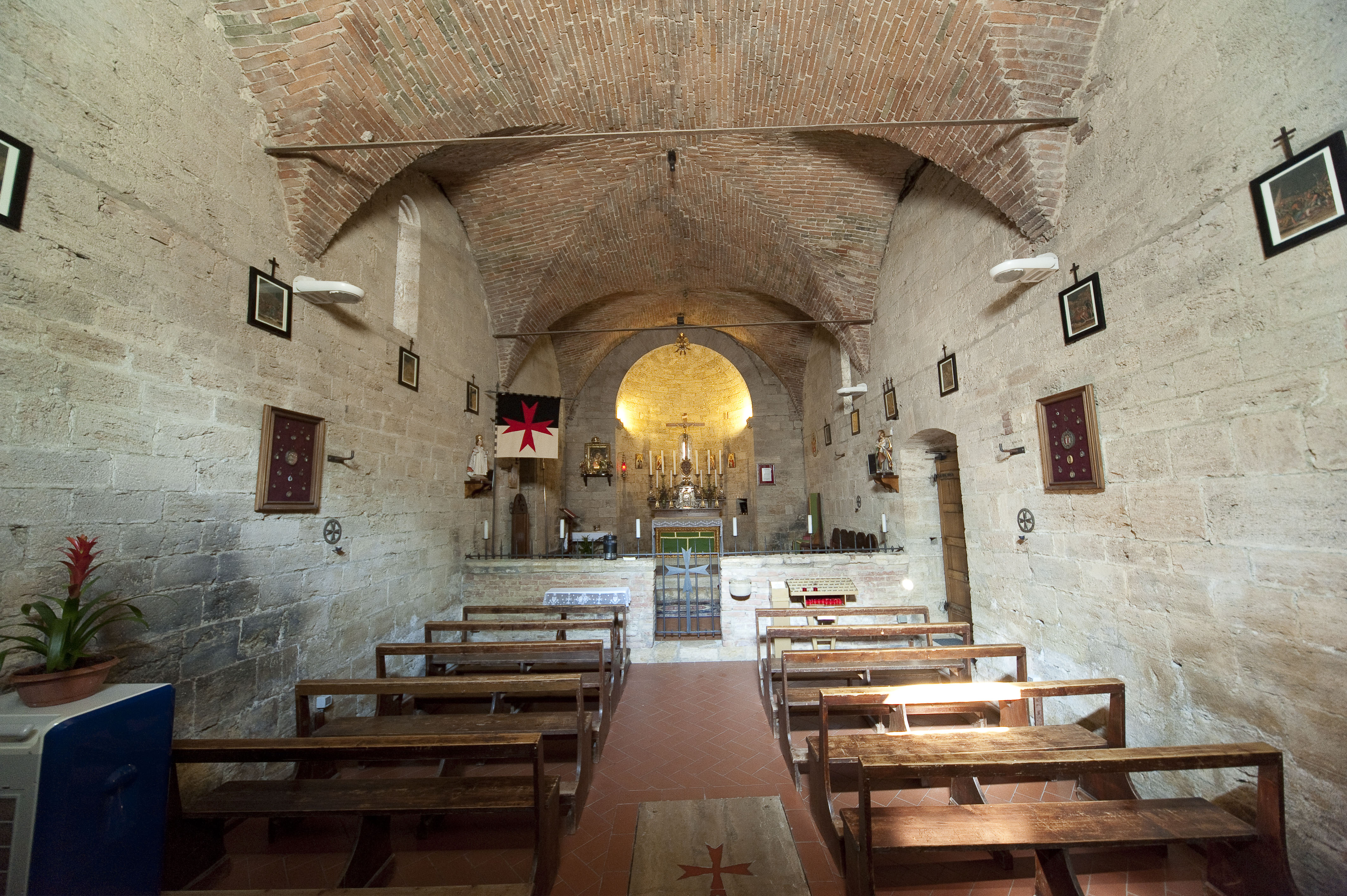 Interno della chiesa di San Giovanni in Jerusalem alla Magione (Poggibonsi)